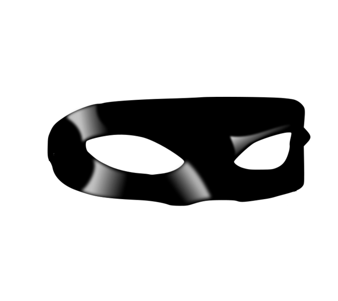 Western domino mask